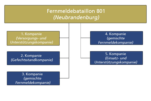 Gliederung FmBtl801